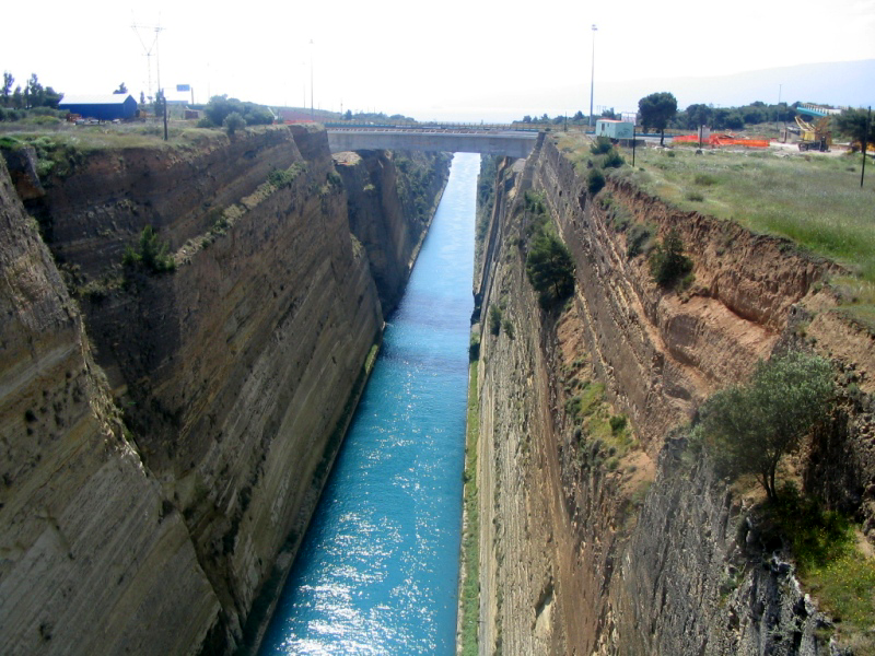 Kanal von Korinth. Die Mündung von Korinth